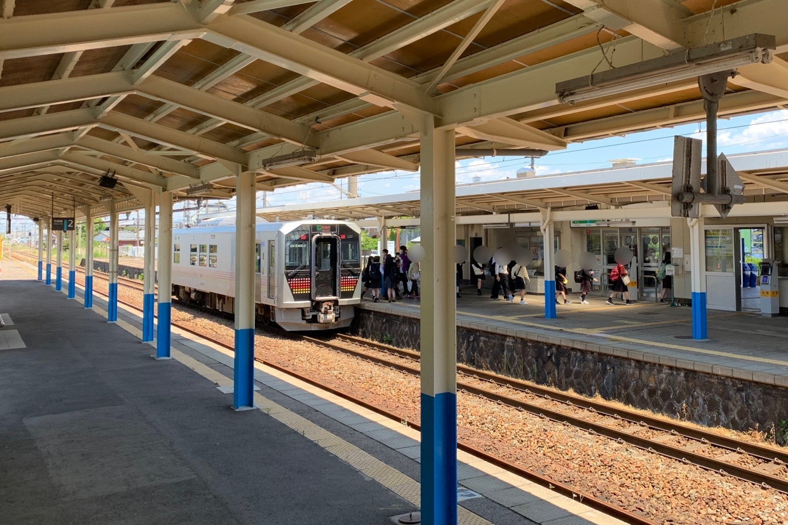 羽越本線水原駅のホーム（2020年5月）